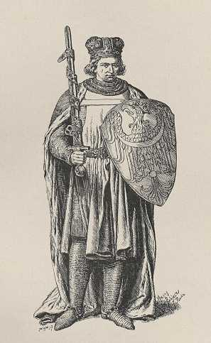 Henryk Prawy